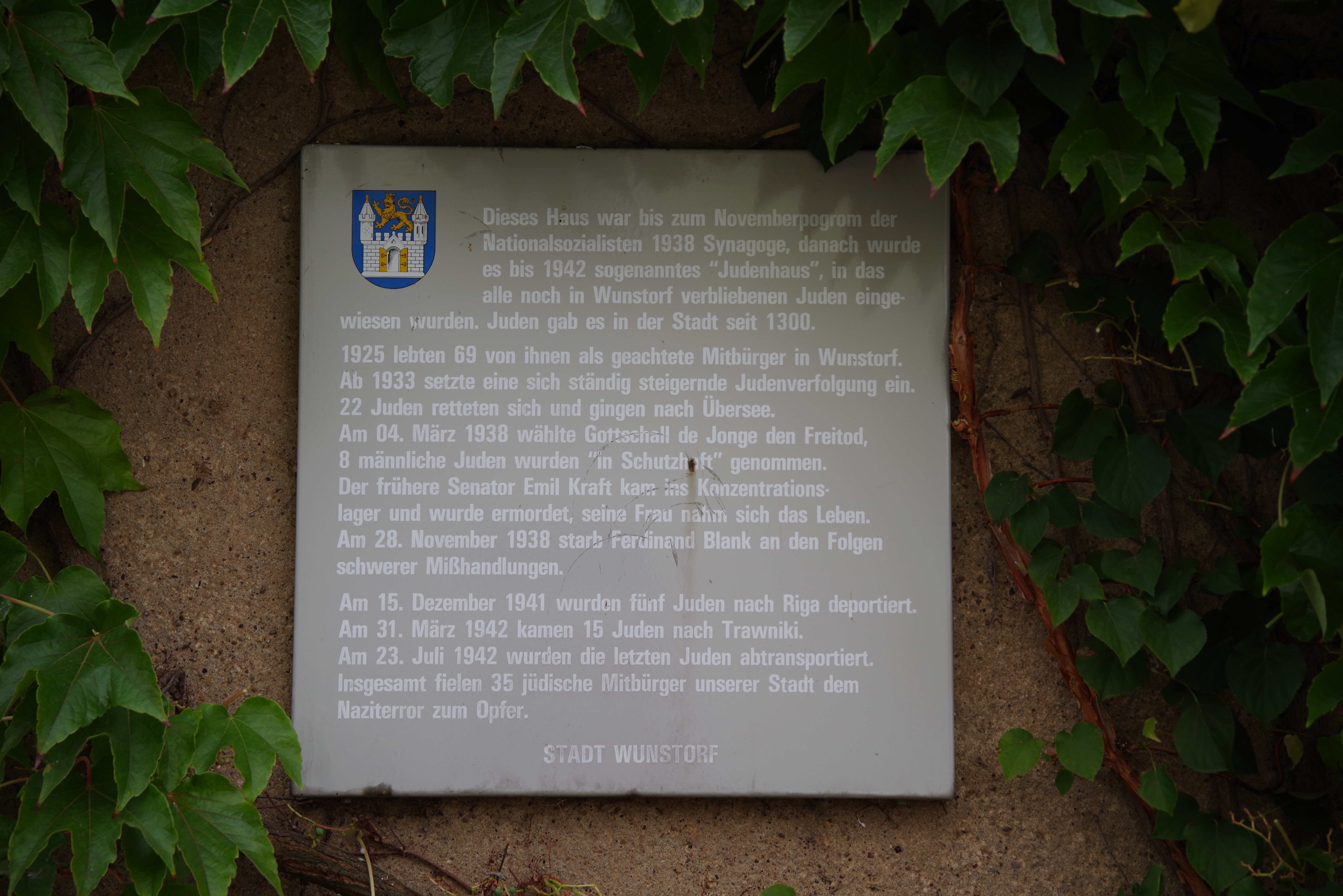 angebracht an der Neuen Synagoge (Wunstorf) von der Stadt Wunstorf